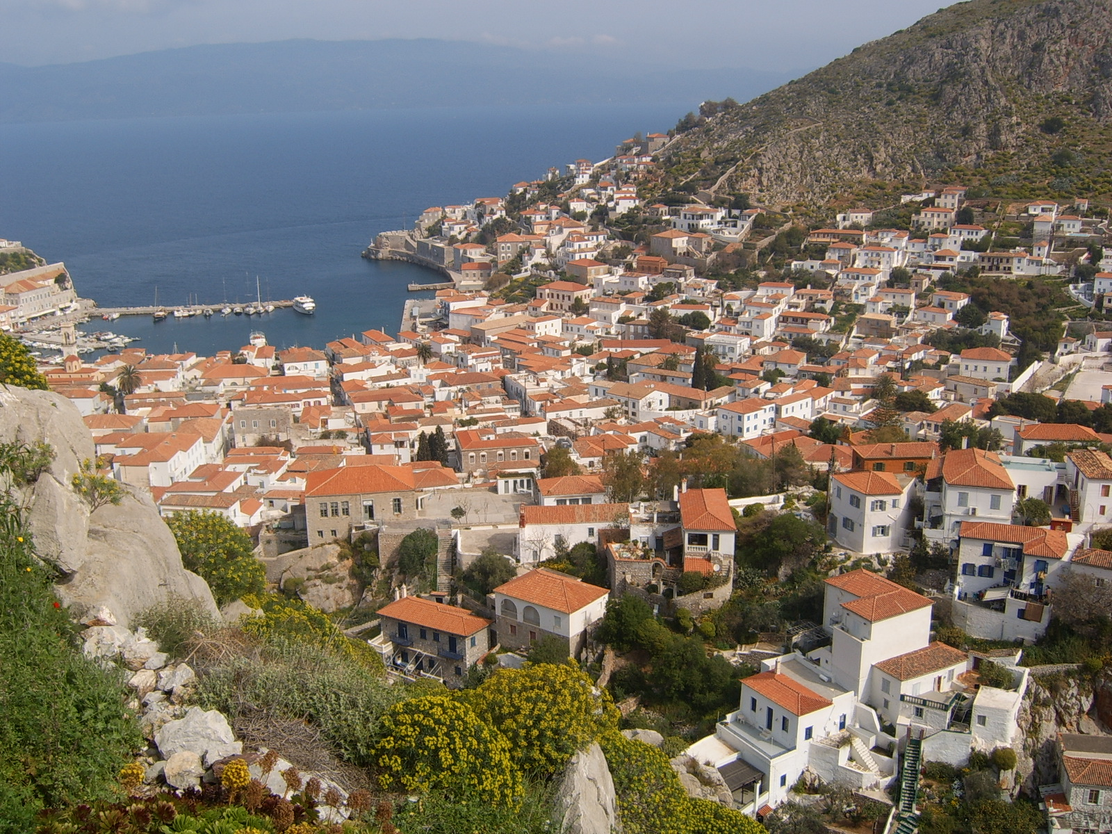 Village d'Hydra